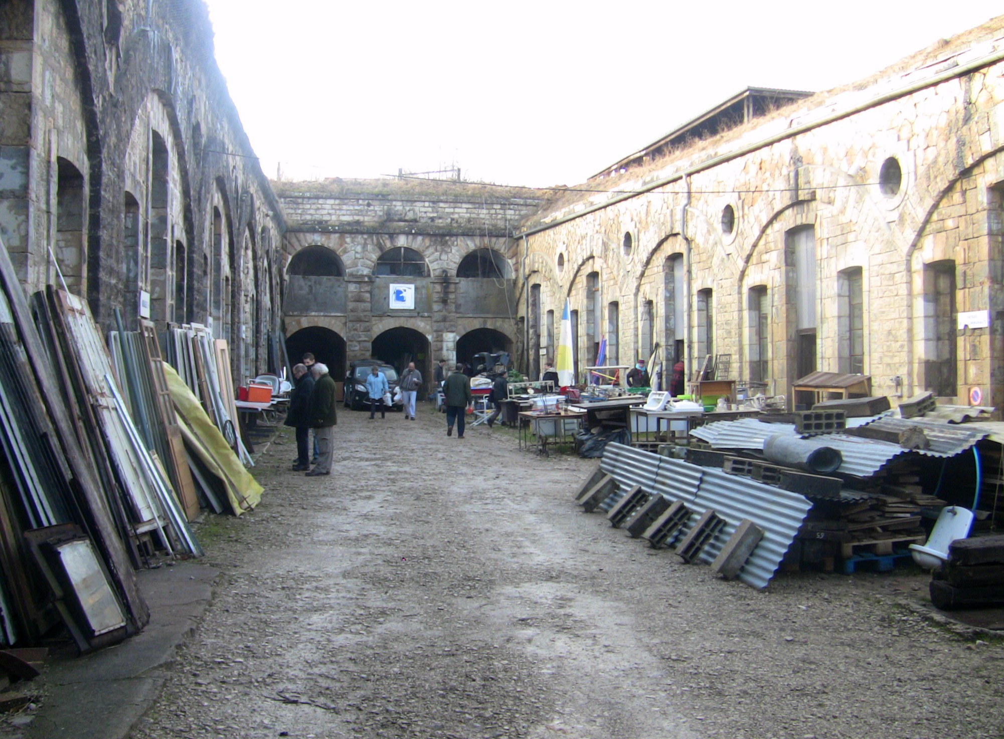 La cour intérieur du fort de Planoise, à Besançon (Doubs, France).